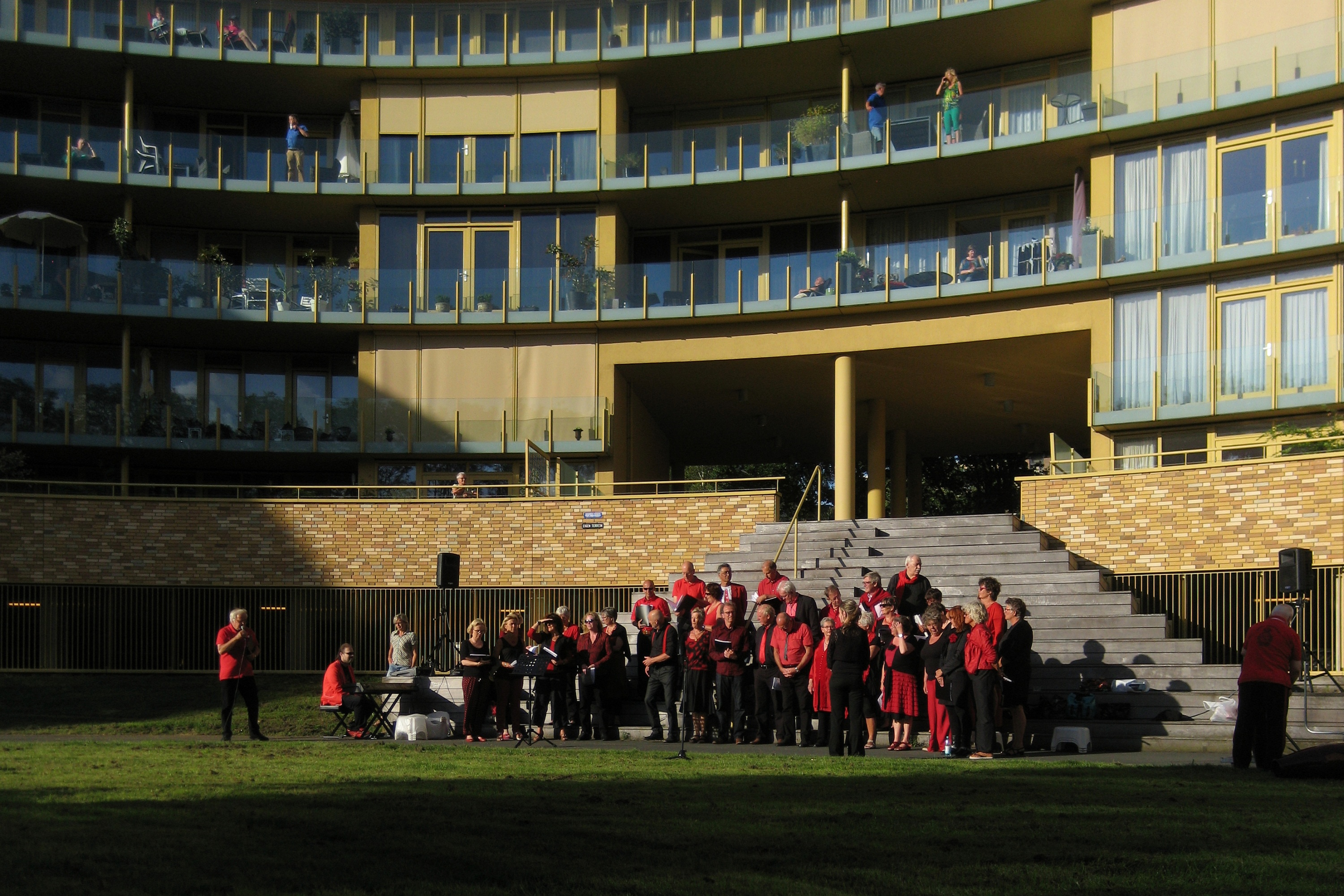 It Grinzer smartlappekoar Eelsk tidens in optreden op it evenemint Dinkelpark in Concert op 11 juny 2014 yn it Dinkelpark yn de Grinzer Rivierenbuurt. Op de eftergrûn it appartemintekompleks Dinkelpark.